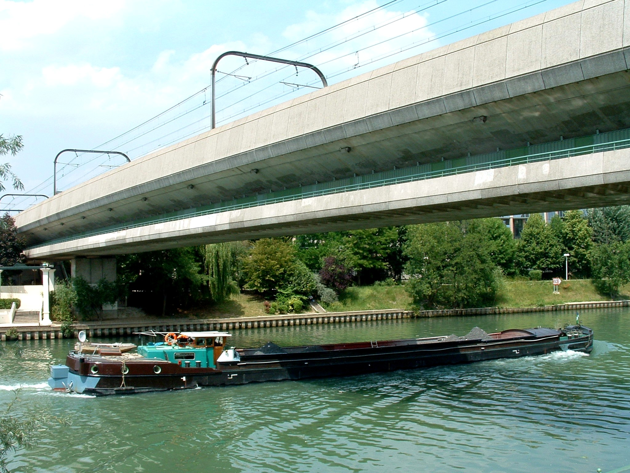 RER A - Pont sur la Marne - Ensemble avec une passerelle vu de l'aval avec péniche